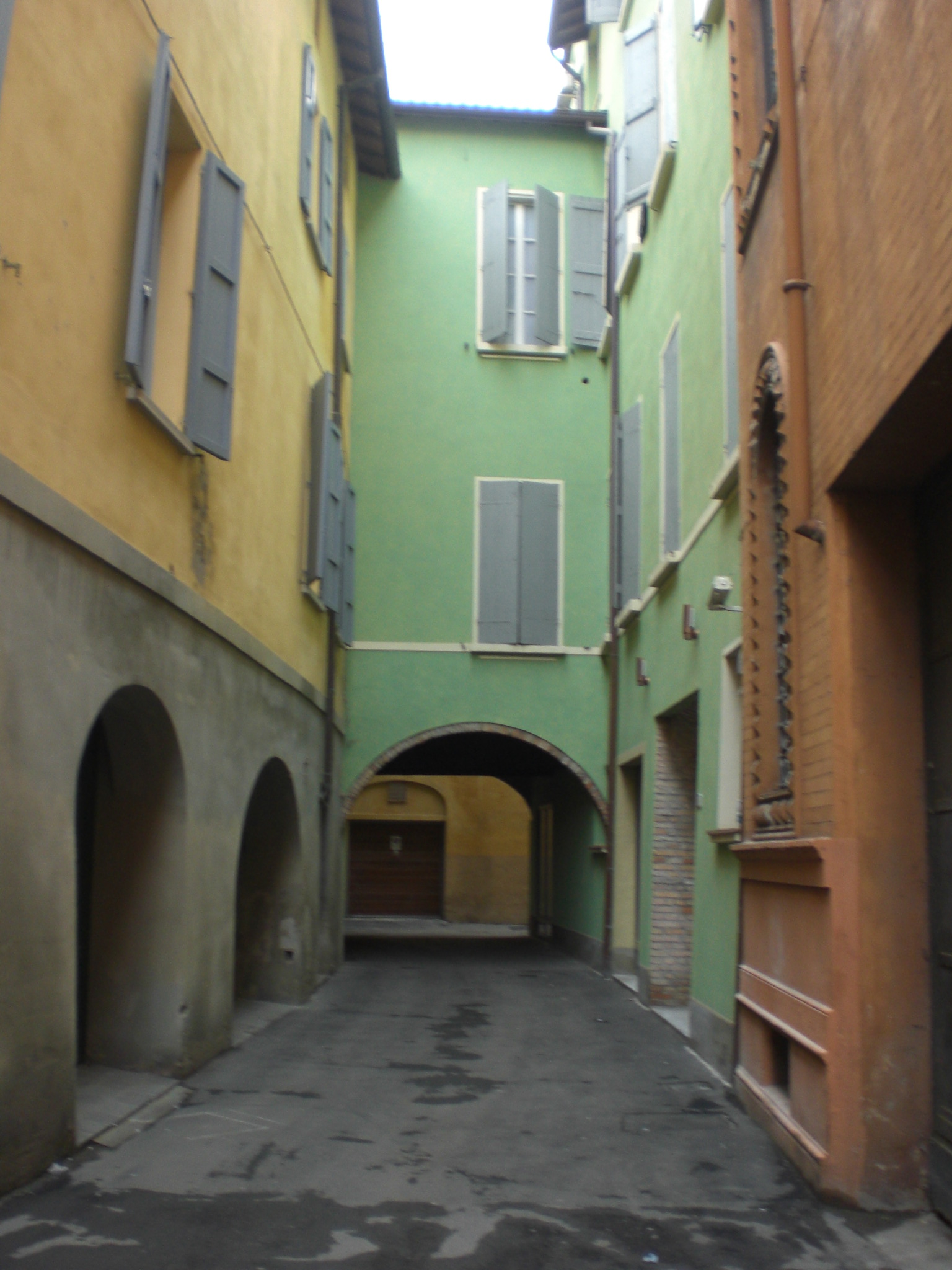 Angolo medioevale a Reggio